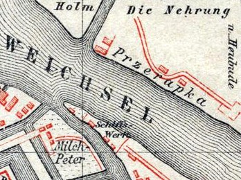 Gdańsk Przeróbka (Przerapka), Polski Hak i Mleczny Piotr (Milchpeter) na planie z 1885 roku.